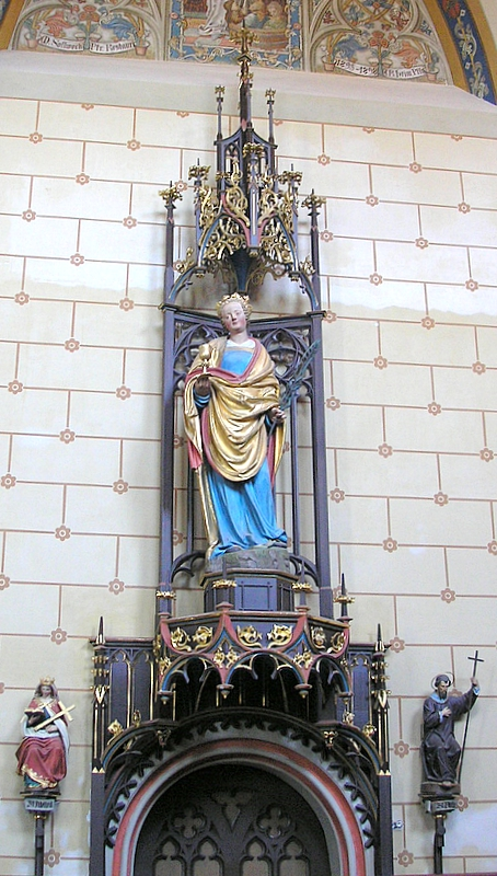 Pfarrkirche St. Anna (Waal bei Landsberg am Lech, Landkreis Ostallgäu, Bayerisch-Schwaben). Hl. Katharina (um 1520/30) im Chor. Eigene Aufnahme, Juli 2007 / Parish church St. Anne (Waal near Landsberg am Lech, Bavaria, Germany). Choir, St. Catherine (ca. 1520/30). Own photo, July 2007